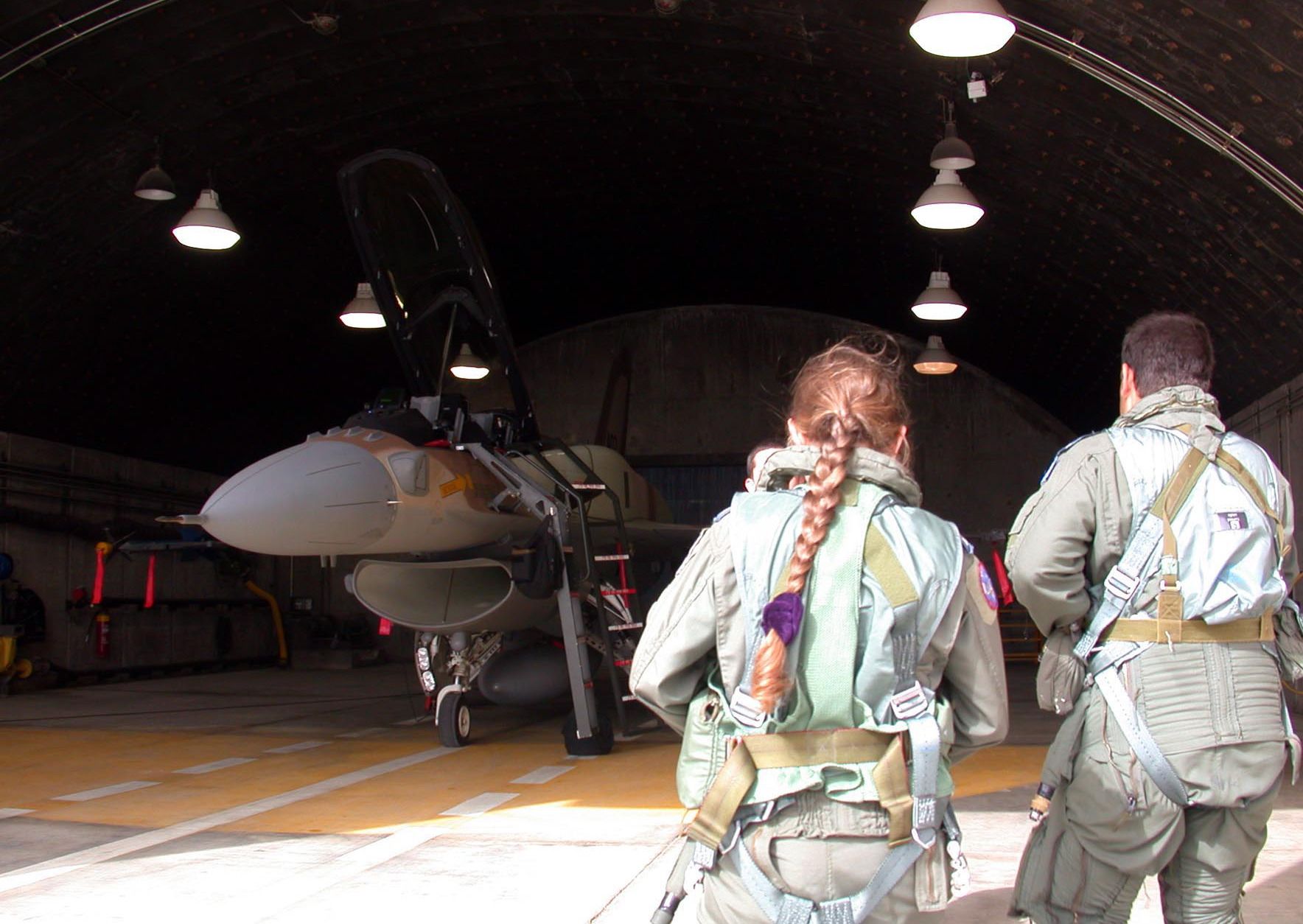 February 3, 2010. Major D. is the first woman in the IDF to fly a F-16I jet. D., a tester pilot at the IAF (Israeli Air Force) Flight Testing Center, flies the Sufa to test one of the jet's systems. Tester pilots fly any of the IAF's jets, demonstrating their knowledge in engineering and utilizing it for the benefit of the IAF. רב-סרן ד' הינה הטייסת הראשונה למטוס ה"סופה". ד', טייסת נסיונית במרכז טיסות הניסוי של חיל האוויר, טסה על מטוס קרב "סופה" בכדי לבחון את אחת ממערכות המטוס. טייסים ניסויים מטיסים את כל מטוסי חיל האוויר, תוך הפגנת ידע בהנדסה ותיעולו לטובת צה"ל.